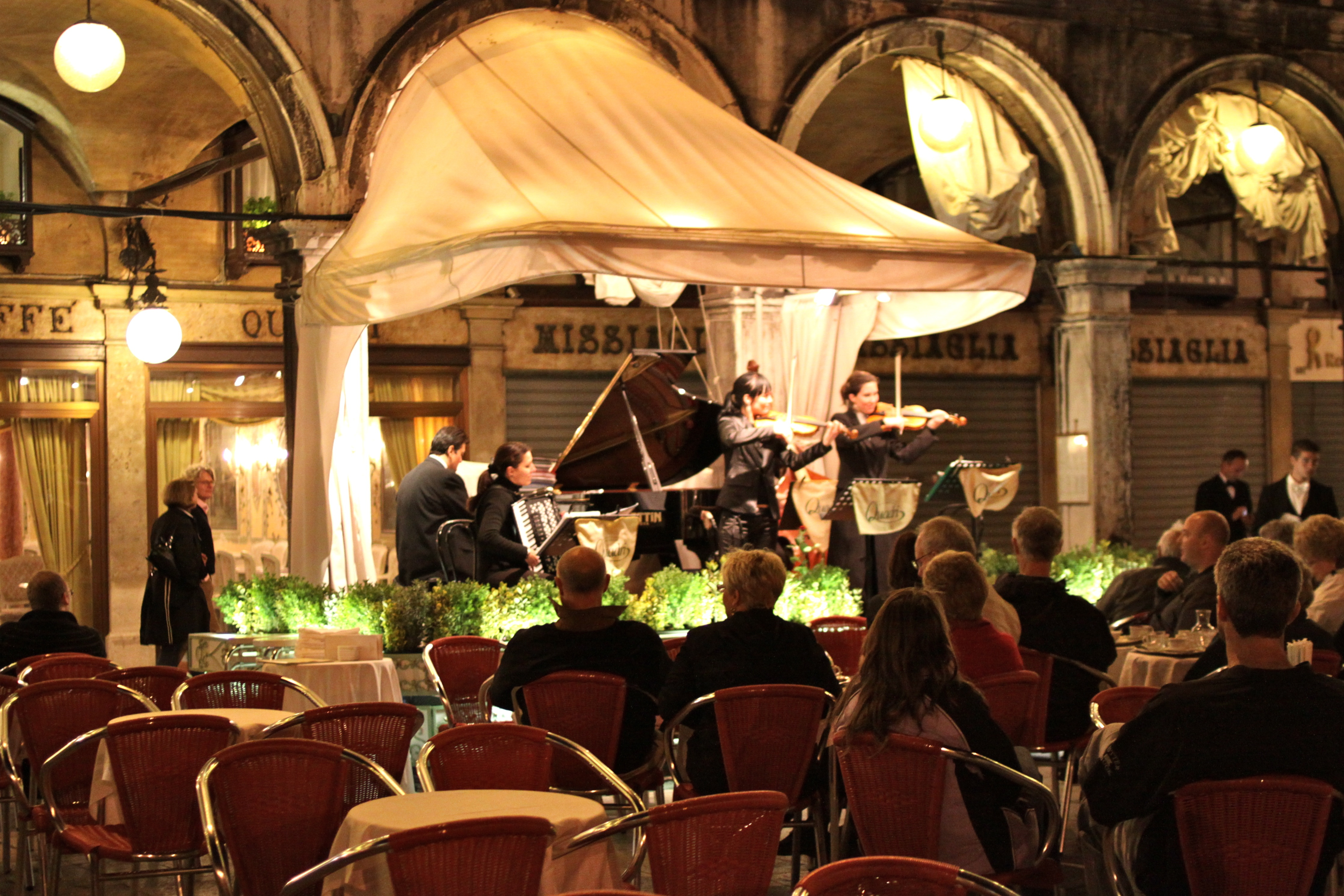 Gran Caffè Ristorante Quadri in Venezia - Italia.